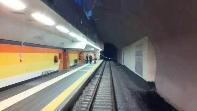 immagine della stazione sotterranea di Adrano Centro